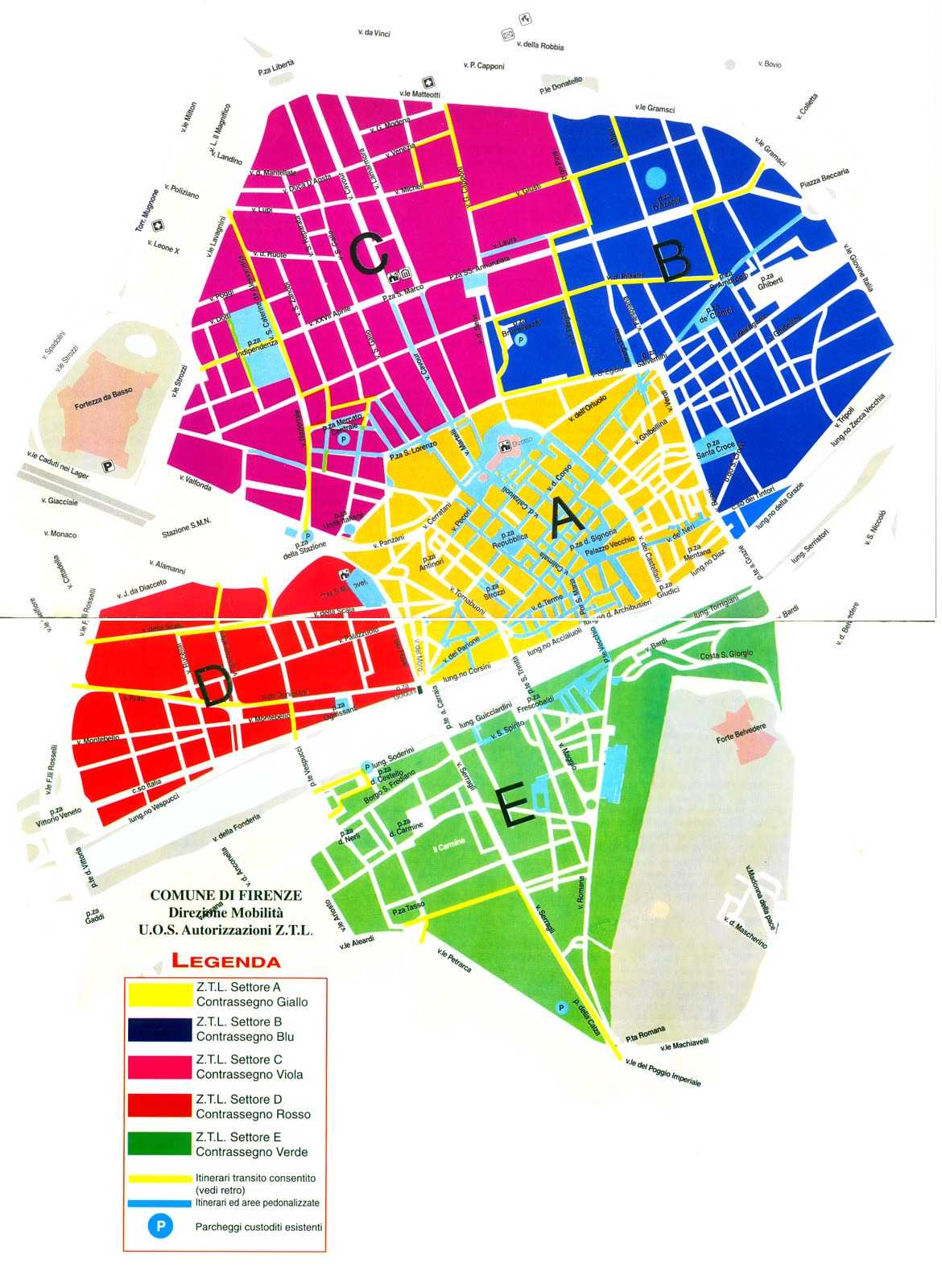 ZTL Map, Florence